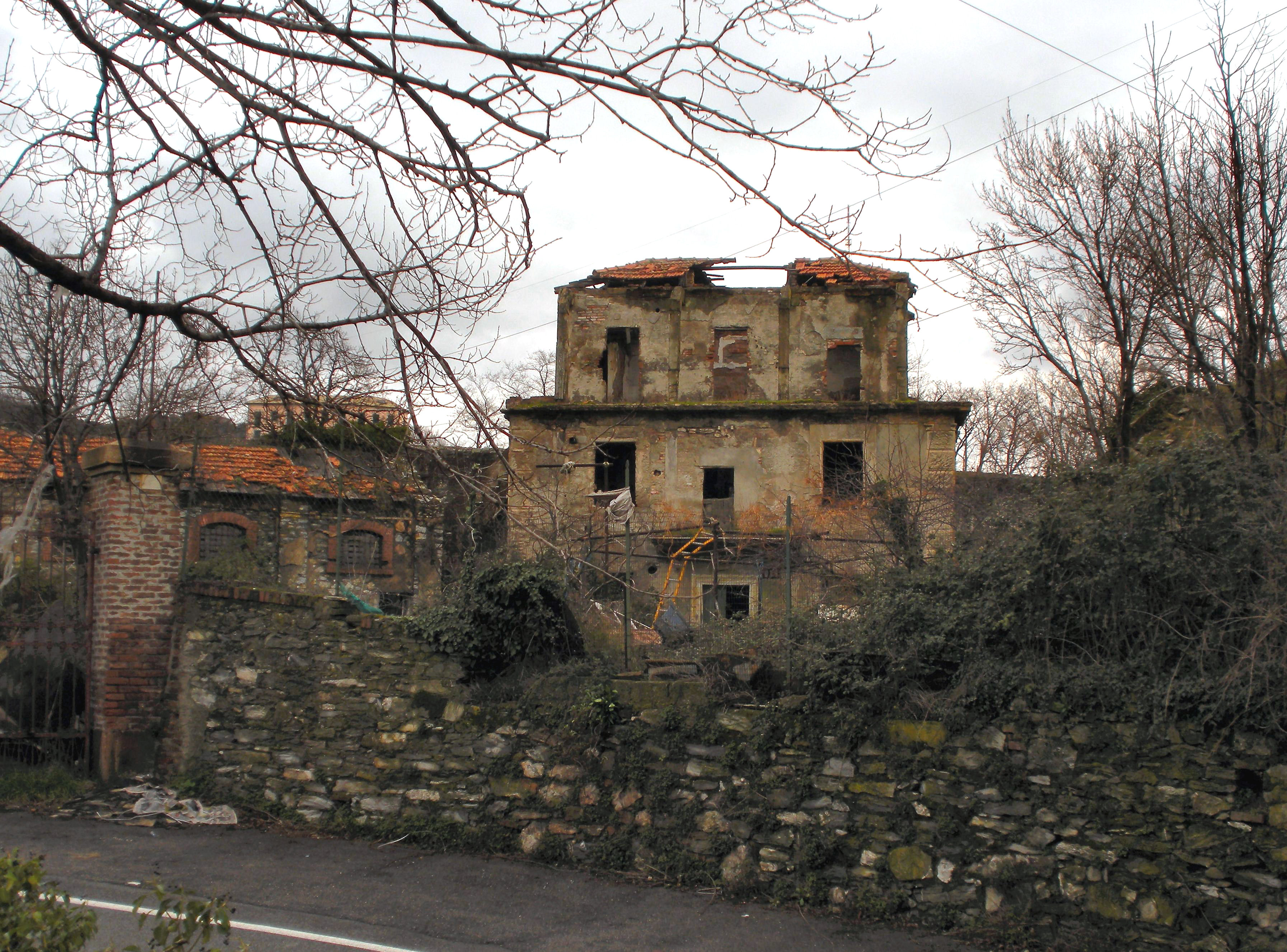 Genova caserma della Batteria Angeli